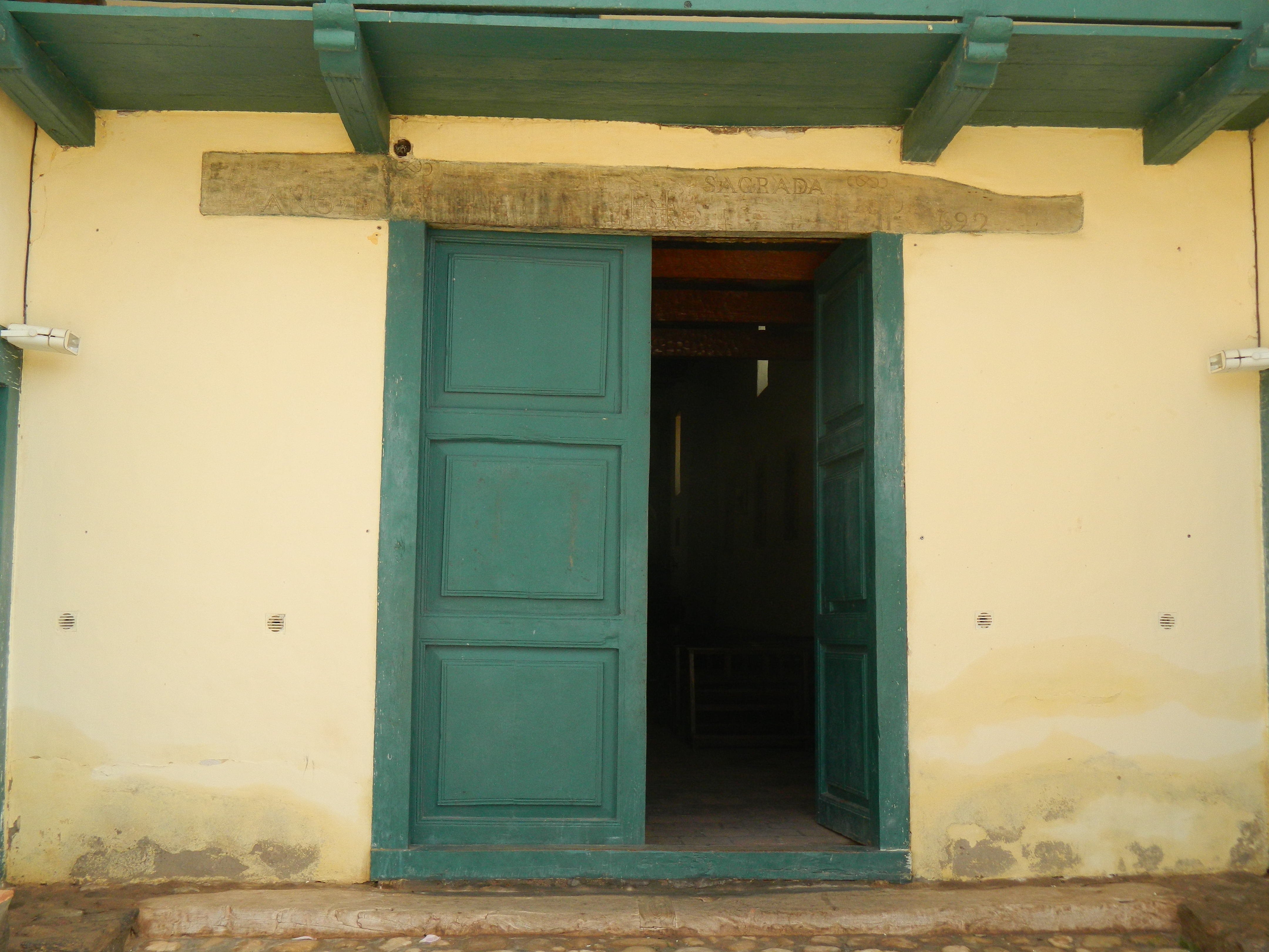 Portón de entrada de la Iglesia de San Pedro de Nolasco.